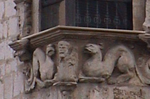 Palacio de Pimentel, ventana de esquina (Valladolid, España)